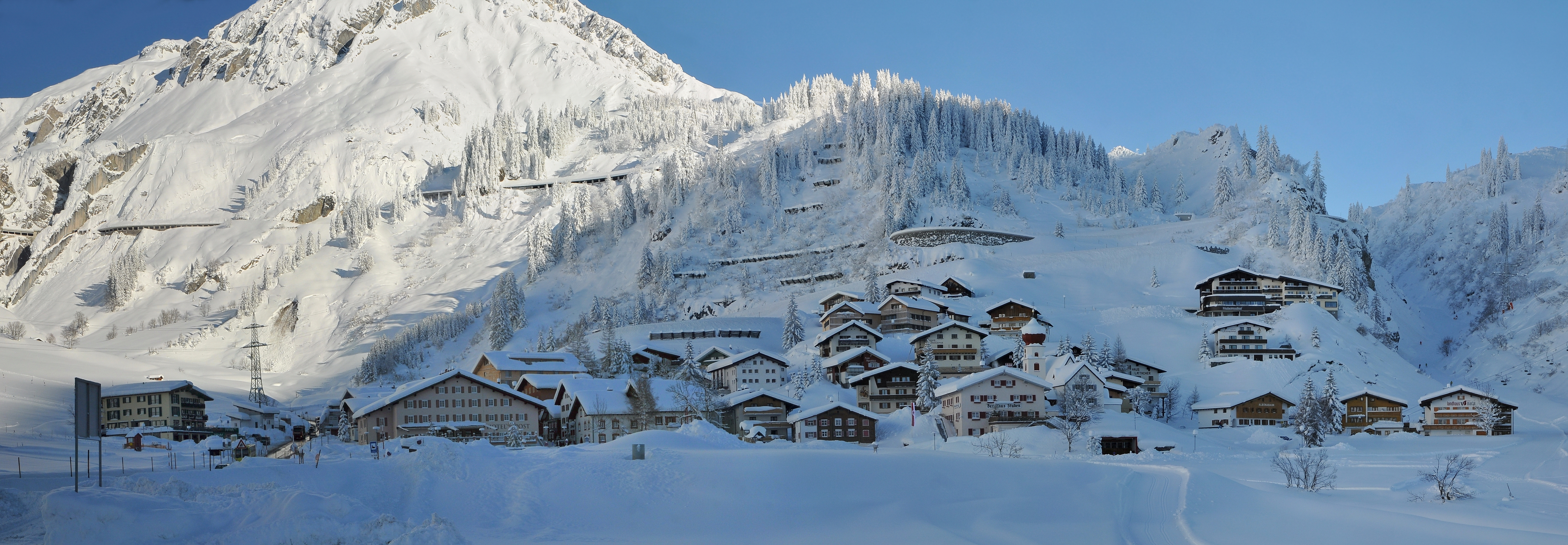 Stuben (Gemeinde Klösterle). NOTE: This image is a panorama consisting of multiple frames that were merged or stitched in software. As a result, this image necessarily underwent some form of digital manipulation. These manipulations may include blending, blurring, cloning, and colour and perspective adjustments. As a result of these adjustments, the image content may be slightly different from reality at the points where multiple images were combined. This manipulation is often required due to lens, perspective, and parallax distortions.